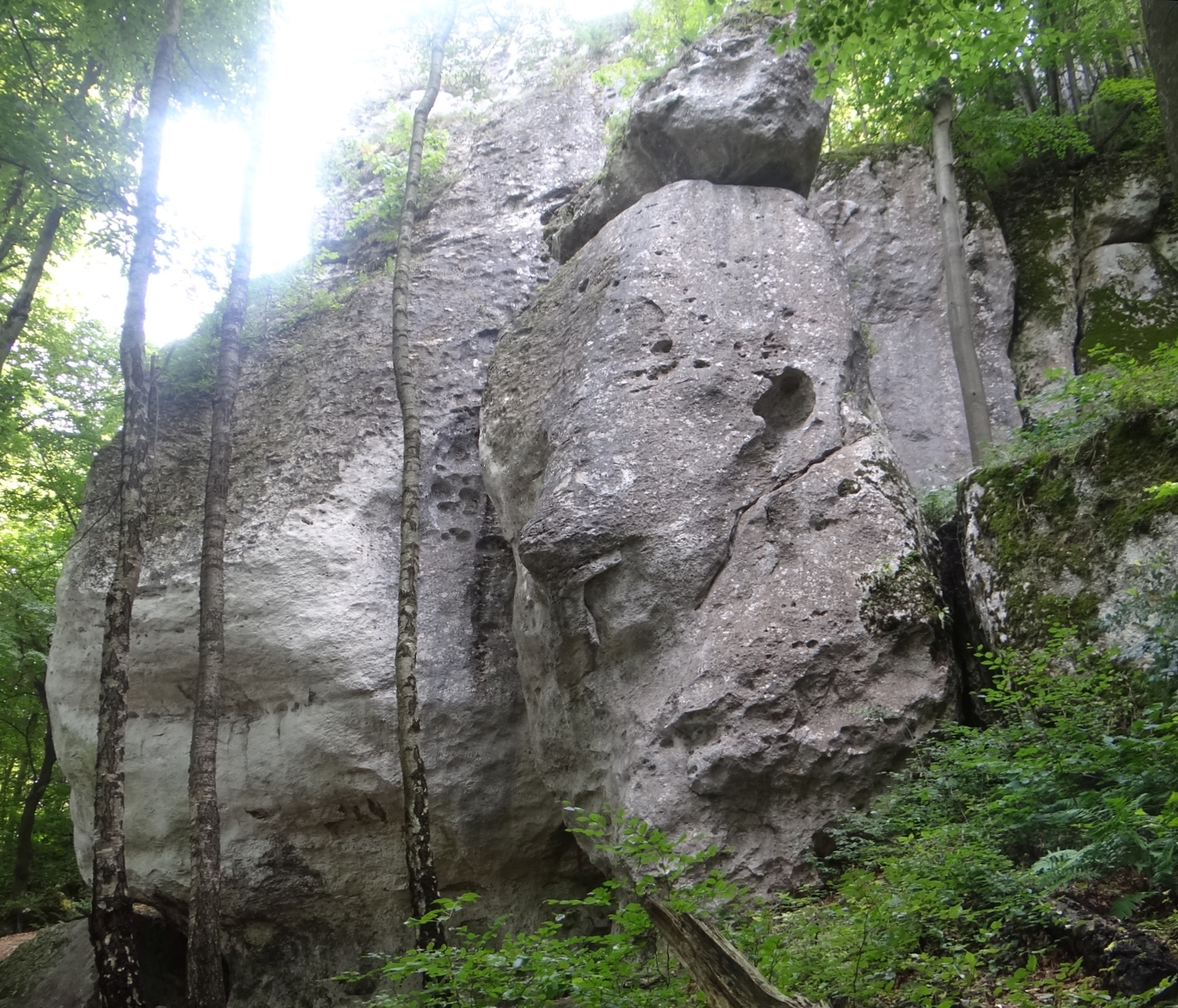 Wysoki Okap. Skała na wzgórzu Jastrzębnik w grupie Skał Kroczyckich na Wyżynie Częstochowskiej